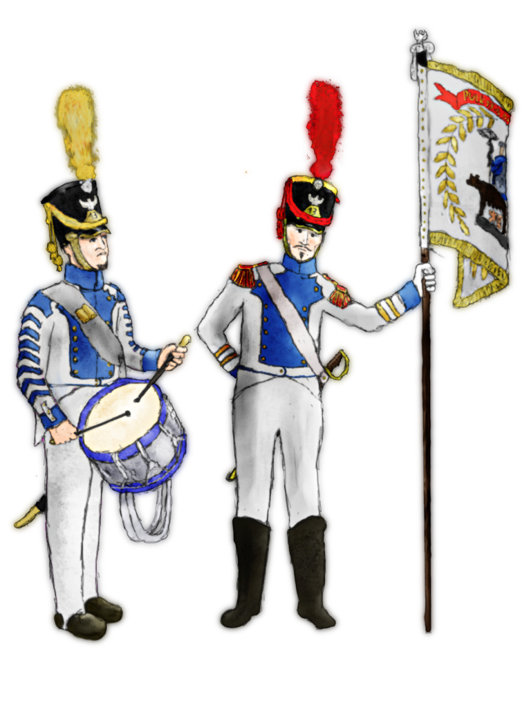 Dobosz oraz sztandarowy 13 pułku piechoty wraz z sztandarem